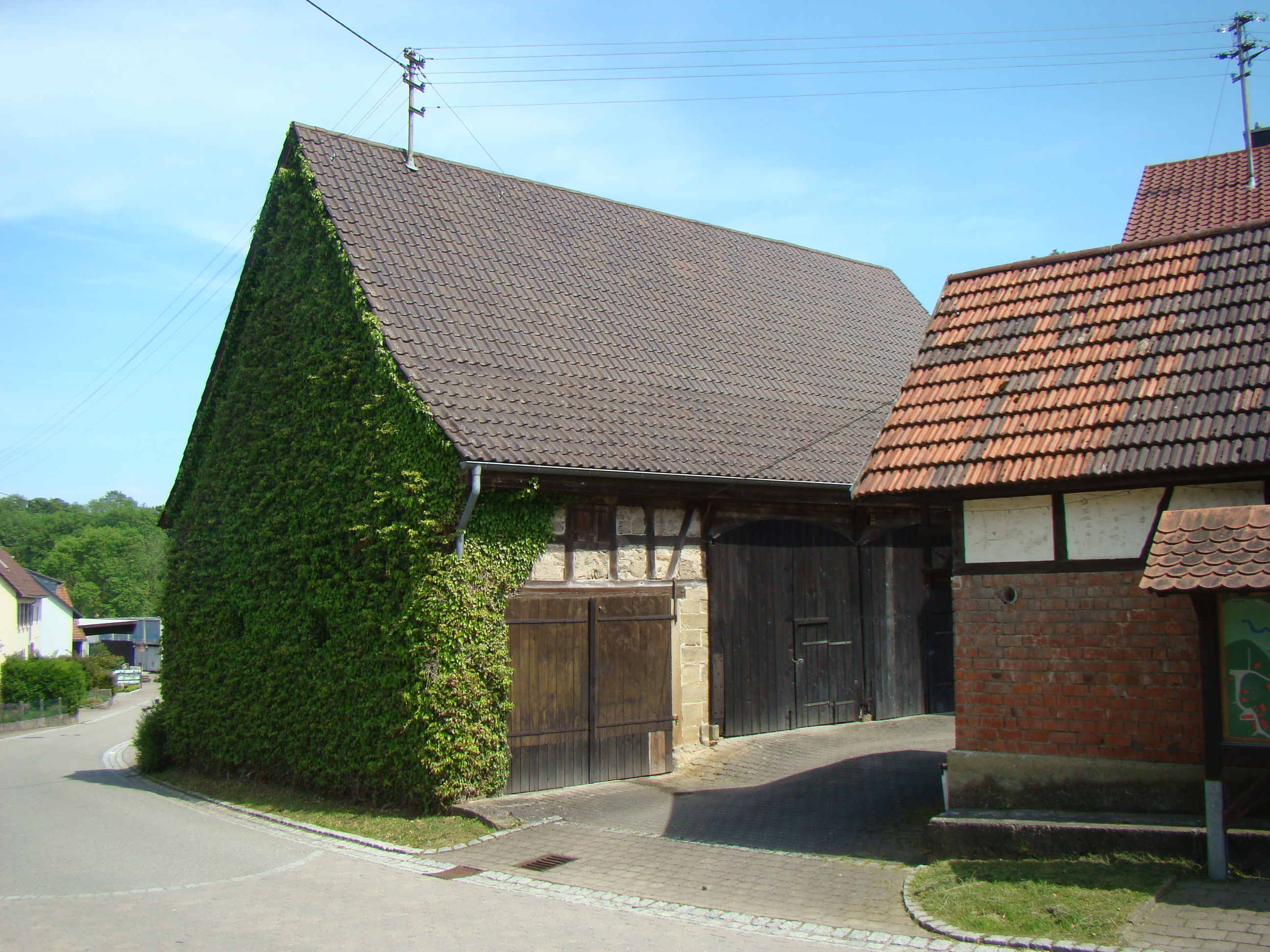 Hist. Gebäude in Langenbrettach-Neudeck